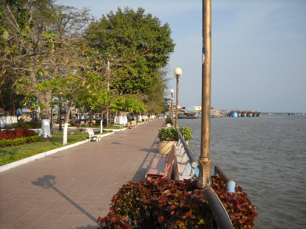 Bến Chương Dương